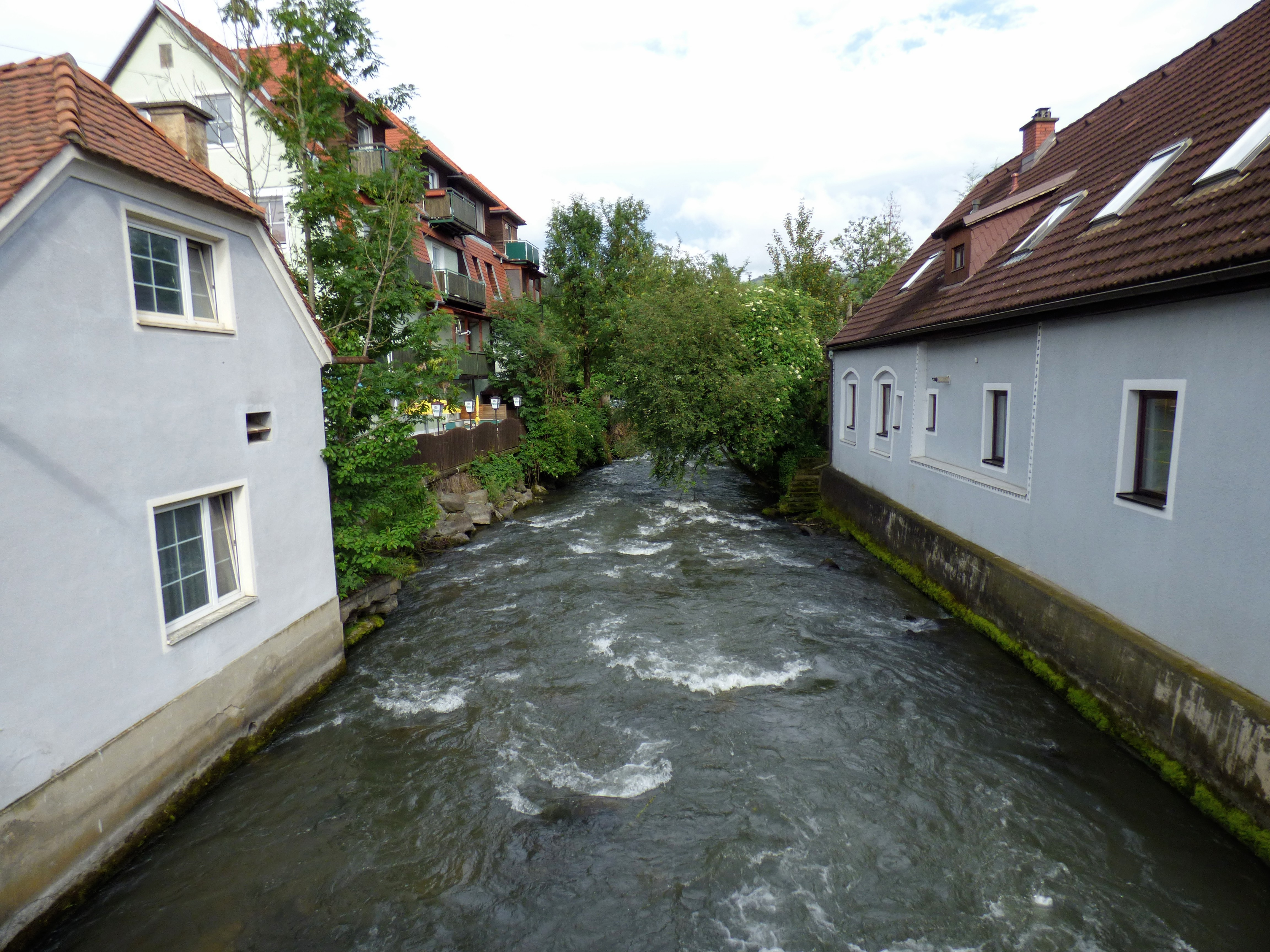 Fluss Liesing, im Ortszentrum von Sankt Michael in Obersteiermark